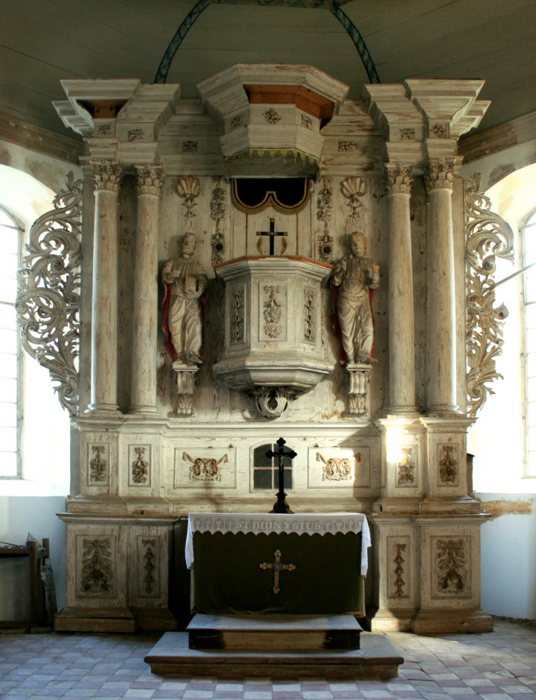 St. Dionysius-Kirche Salomonsborn. Der barocke Altar wurde 1838 weiß übertüncht. Seine Bekrönung fehlt auf diesem Bild.